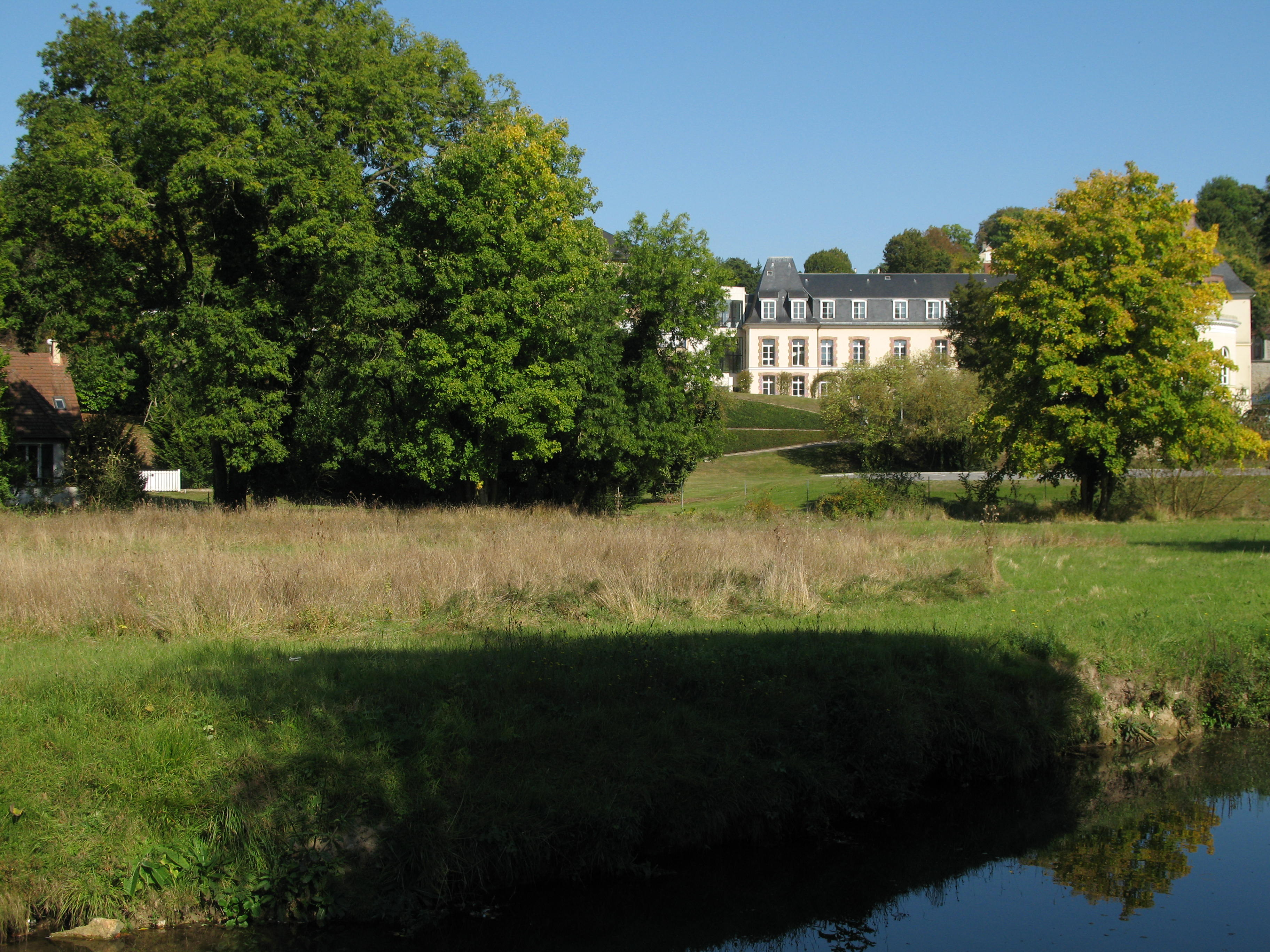 Vue du château de Septeuil (Septeuil, Yvelines) depuis la Vaucouleurs (rivière)